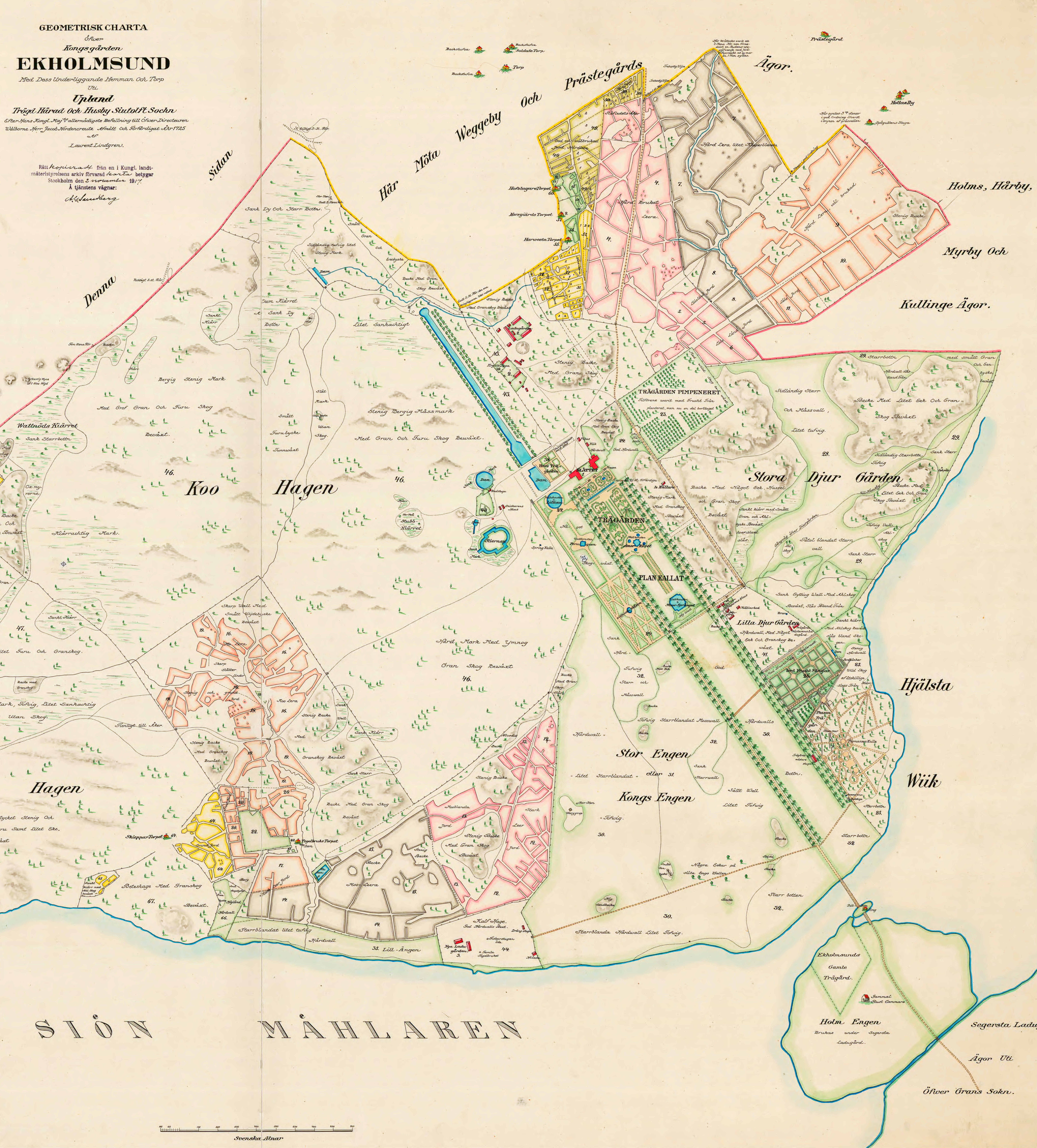 Karta över Ekolsunds slott med omgivning